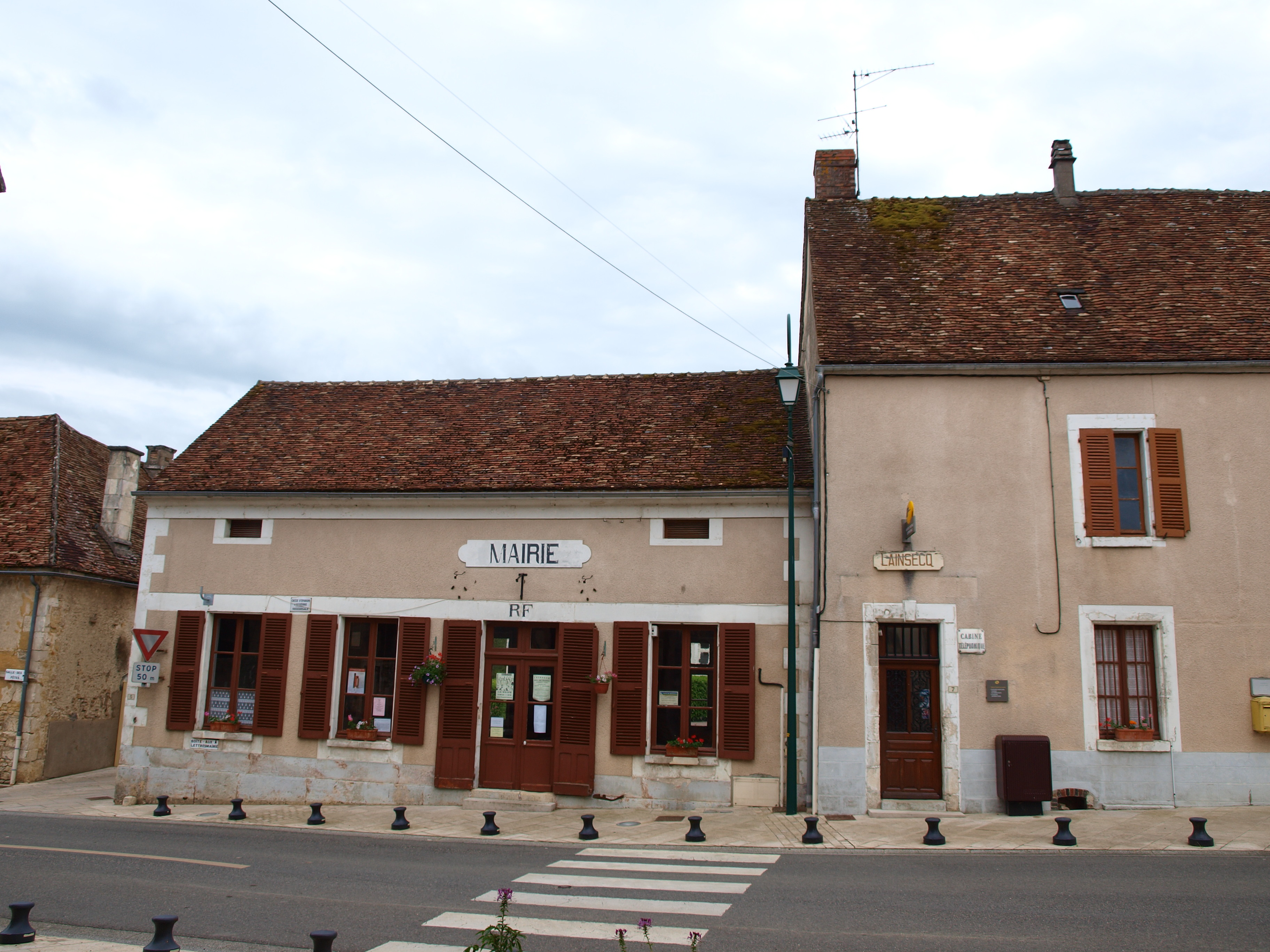 Lainsecq (Yonne, France)